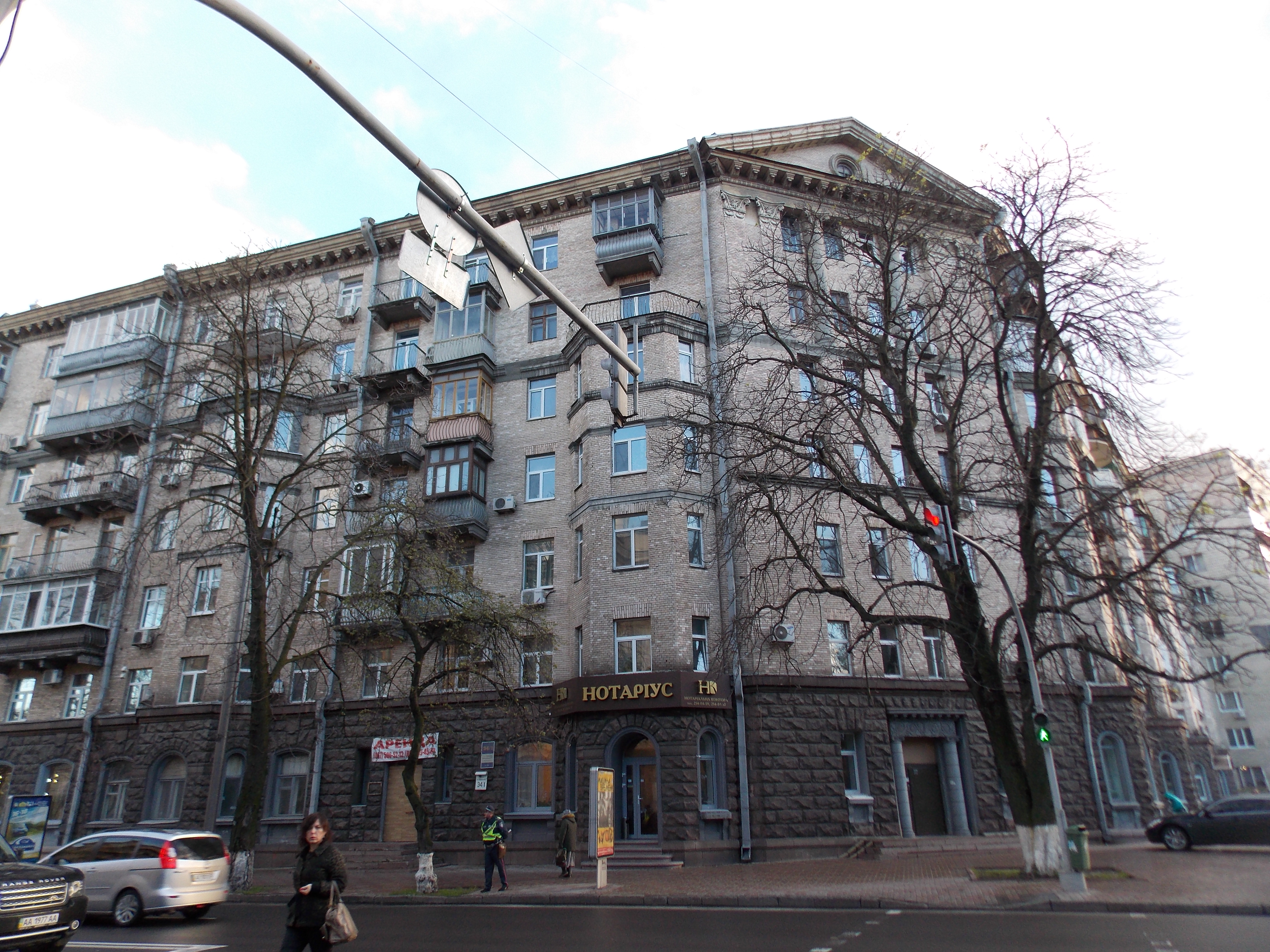 Киев, улица Михаила Грушевского, 34/1